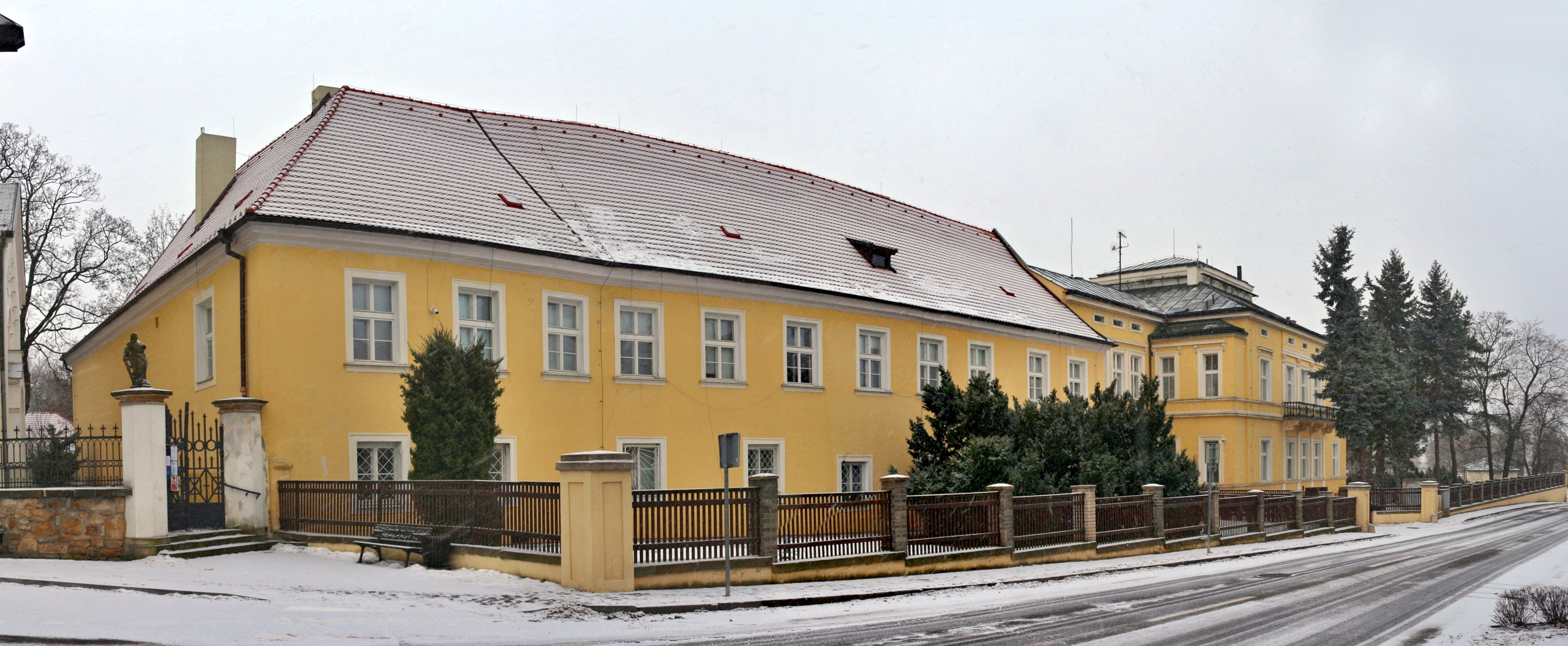 Zámek v Dolních Počernicích